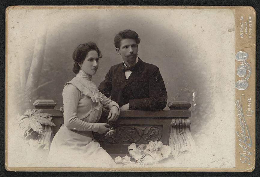 Антон и Стефка Страшимирови